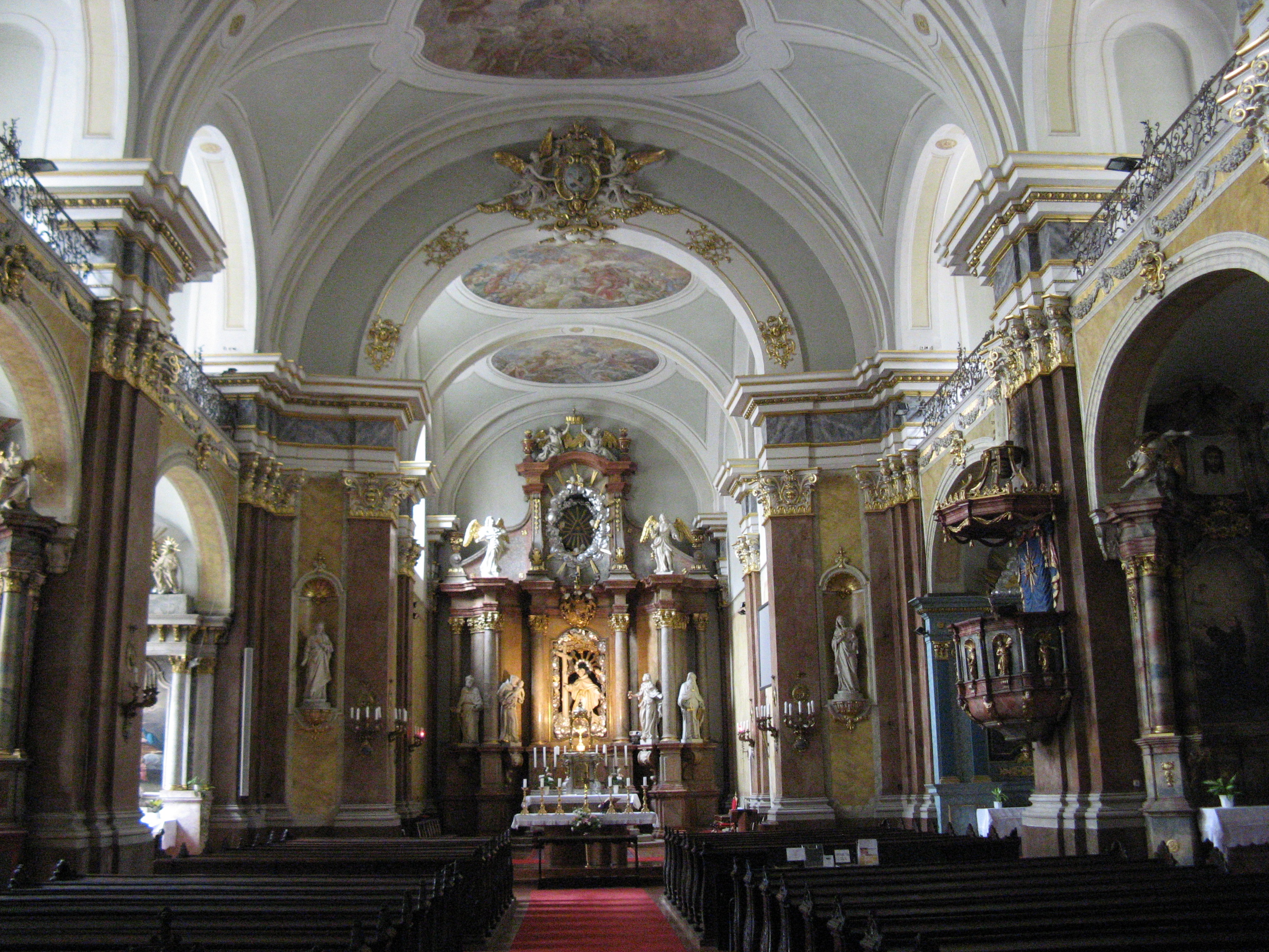 Innenraum der Innerstädtischen Franziskanerkirche, Budapest